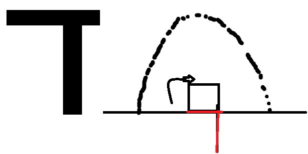 hebrew letter dalet schema